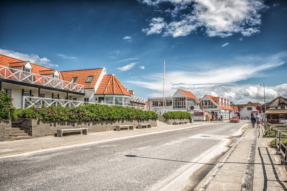 Strandvejen Blokhus 2014